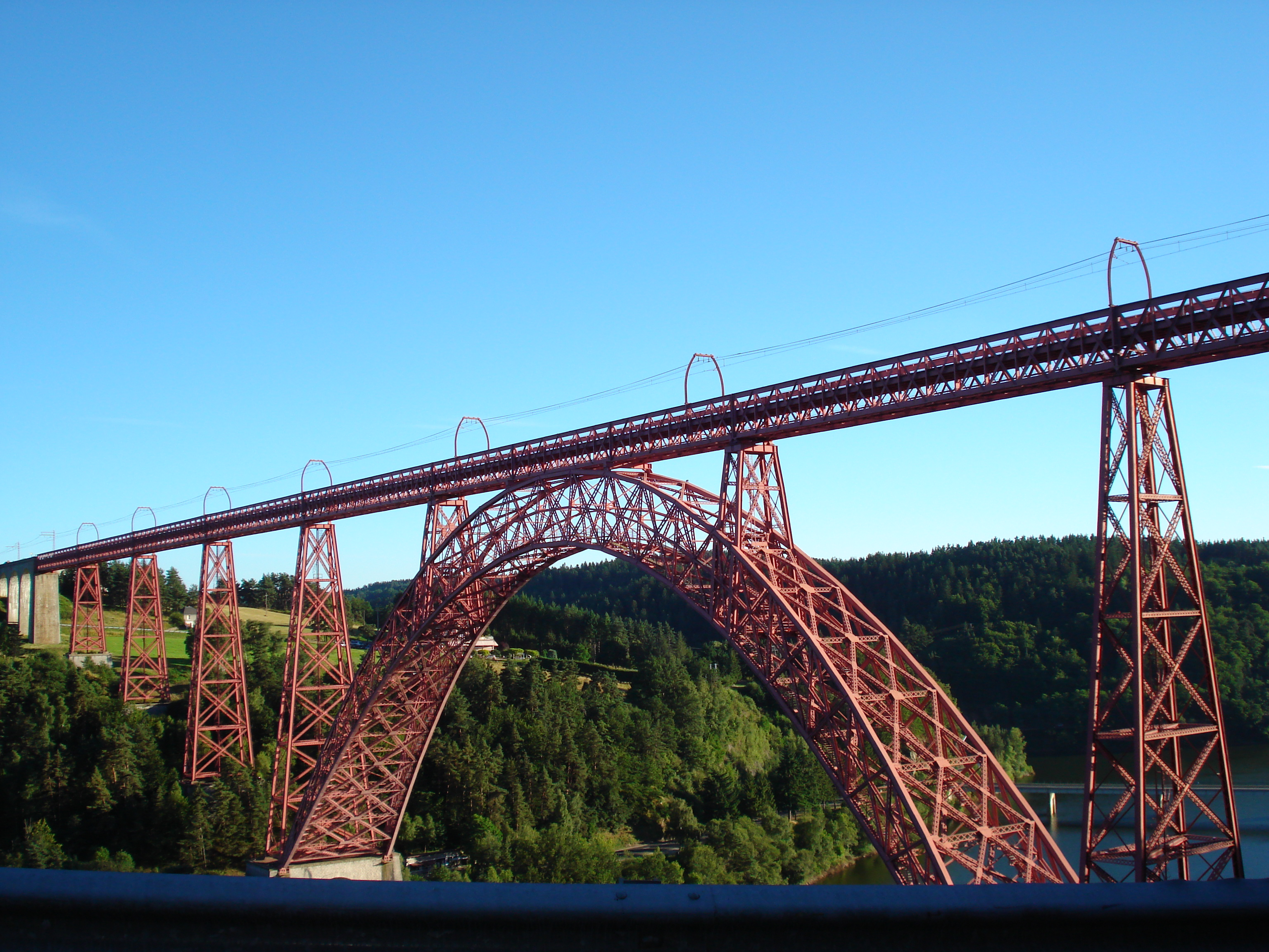 Le Viaduc de Garabit un soir d'été